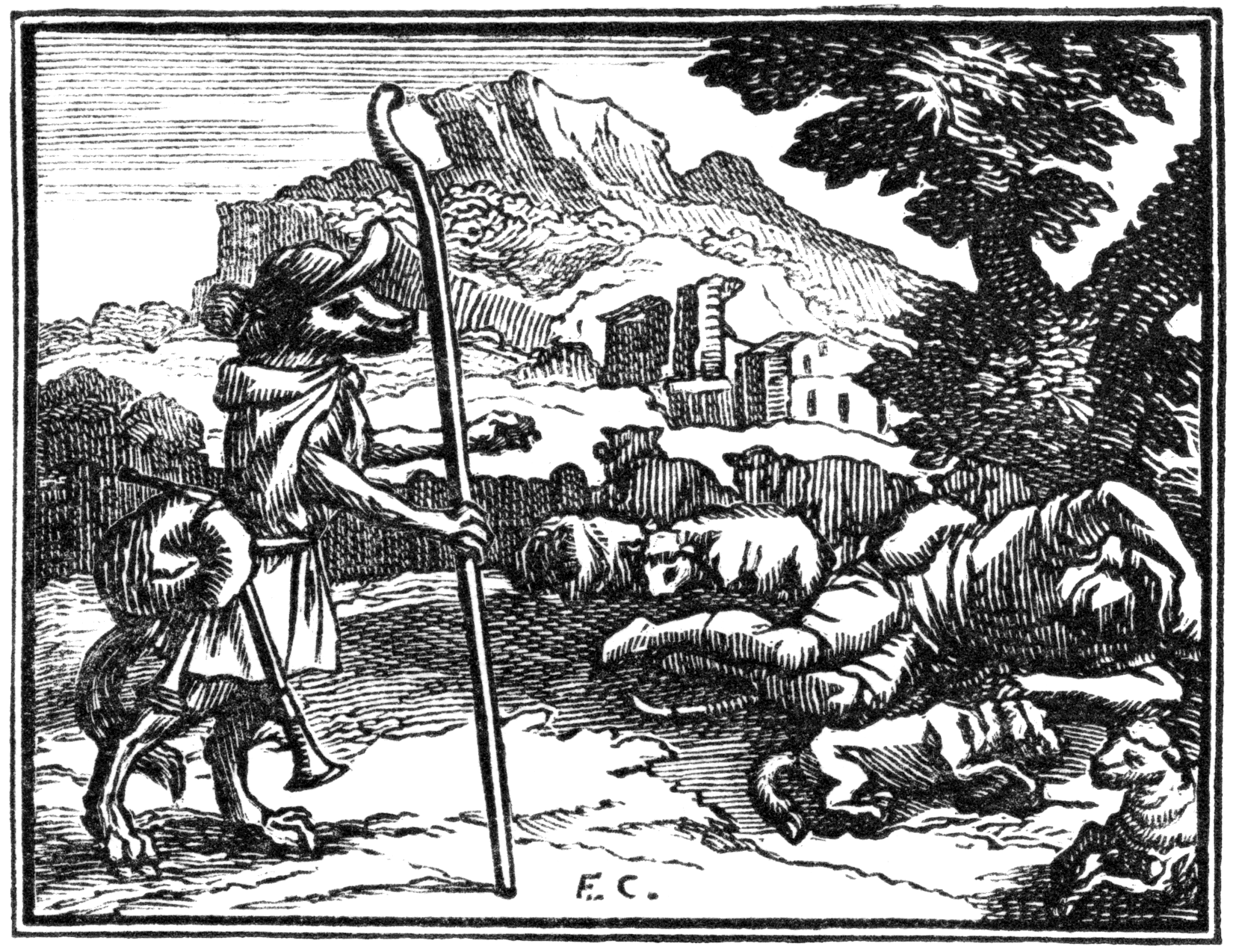 Illustrations pour les « Fables choisies mises en vers par M. de la Fontaine », Claude Barbin et Denys Thierry, Paris, 1668 (premier recueil) 1678-79 (deuxième recueil) 1694 (troisième recueil). Numérotation Charpentier (1705).